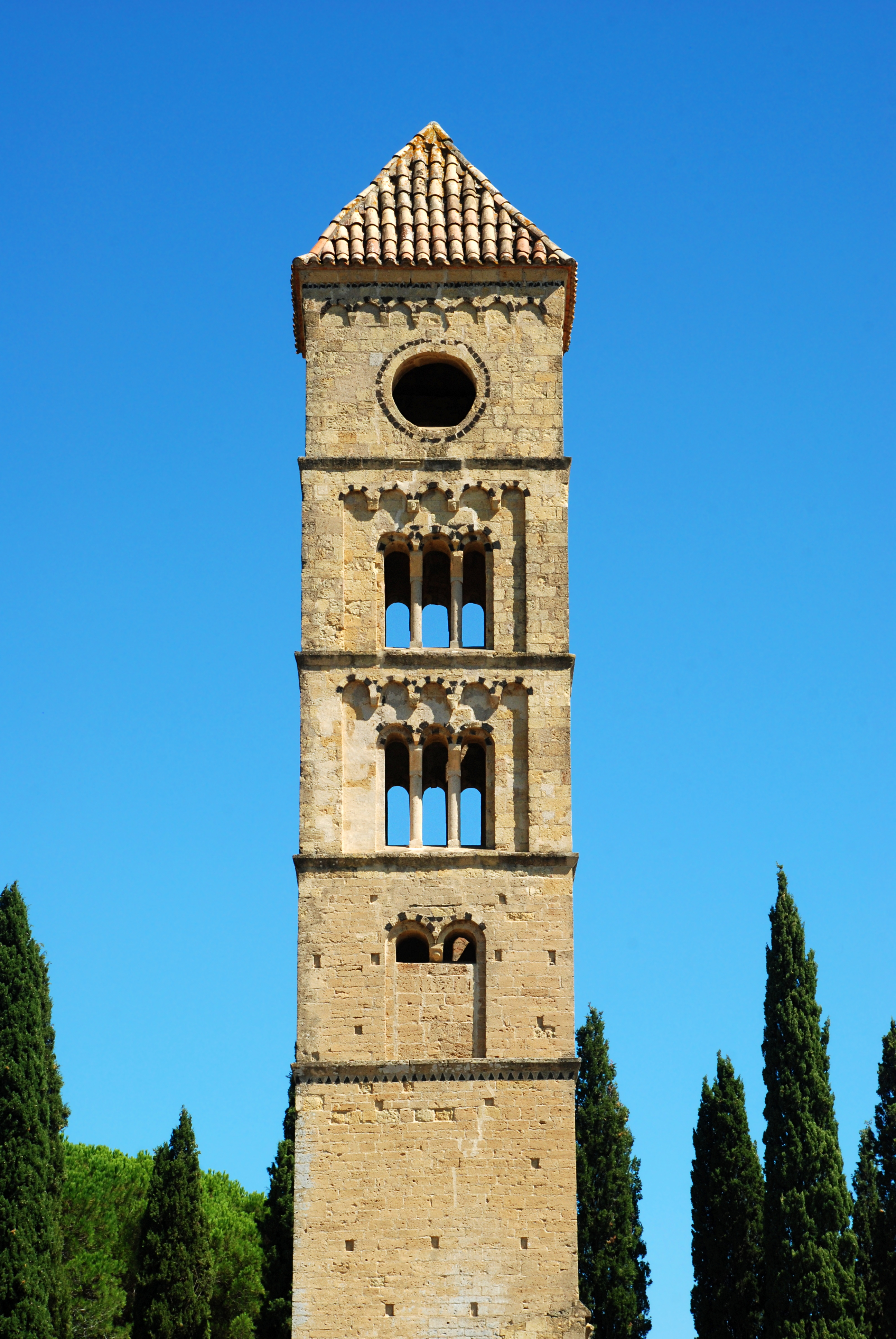 France - Languedoc - Hérault - Puissalicon - ancienne église Saint-Étienne de Pezan - tour romane .